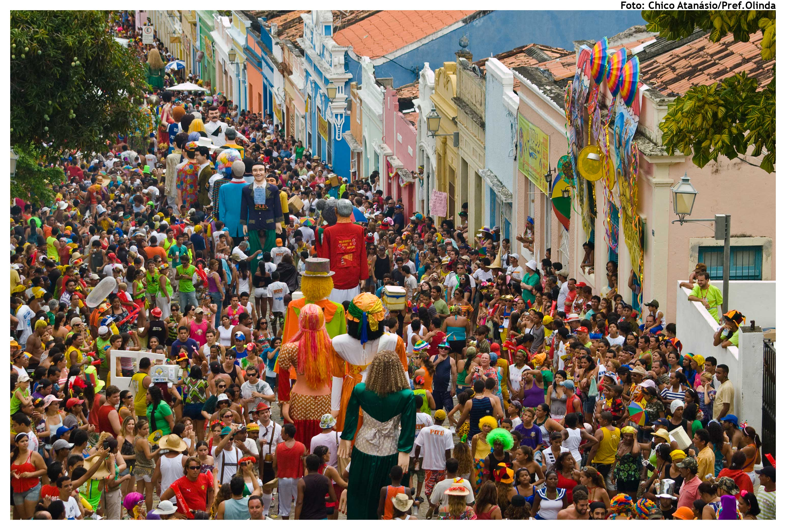 Foto: Chico Atanásio/Pref.Olinda